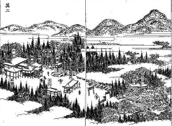 三国名勝図会第10巻掲載の花尾神社